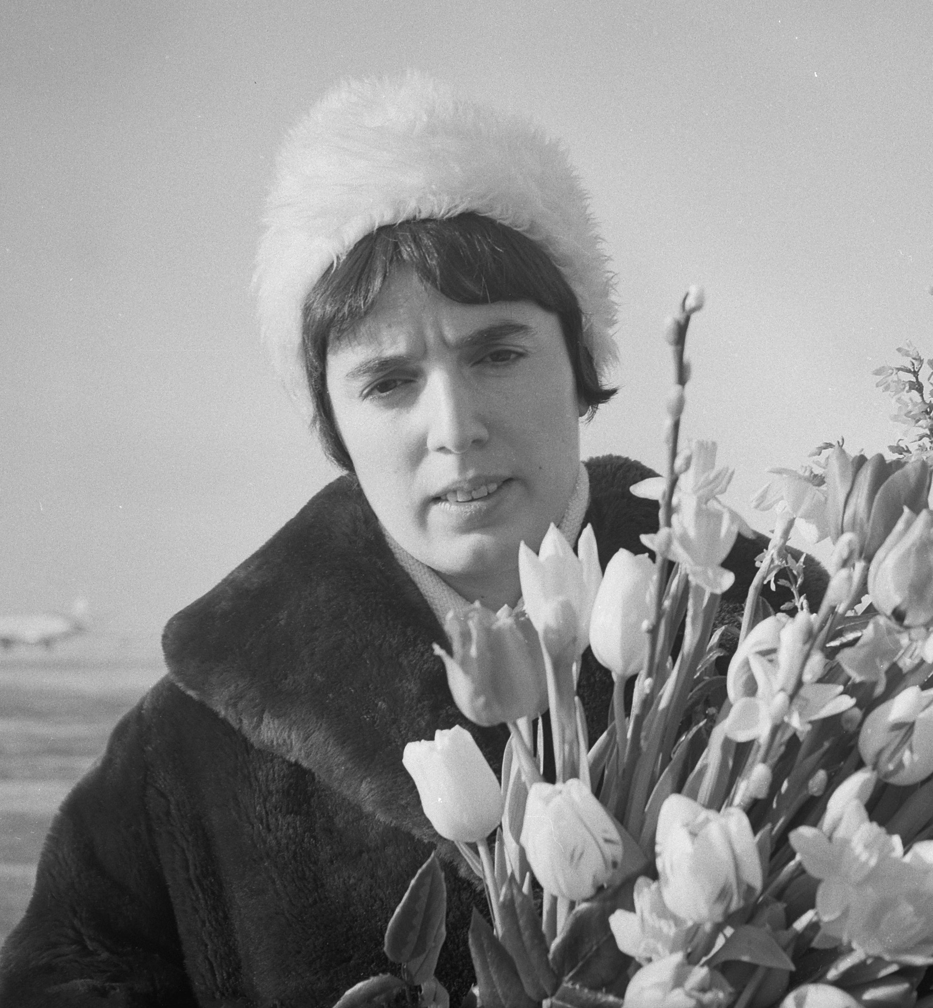 Wereldkampioene schaken de Russin Nona Geprindasjwili op Schiphol.